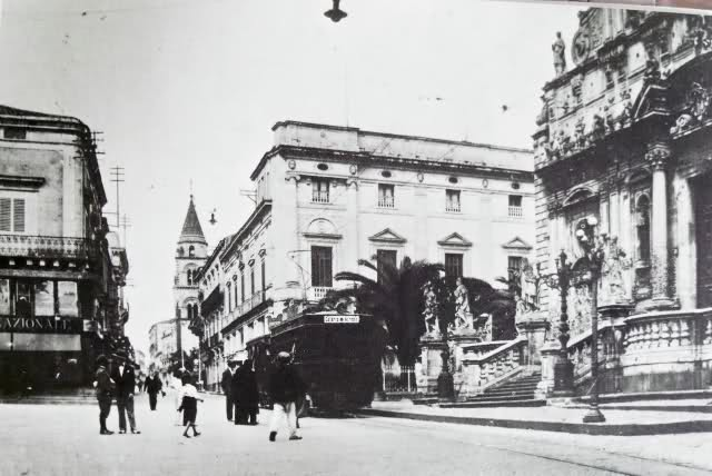 immagine di convoglio tranviario ad Acireale